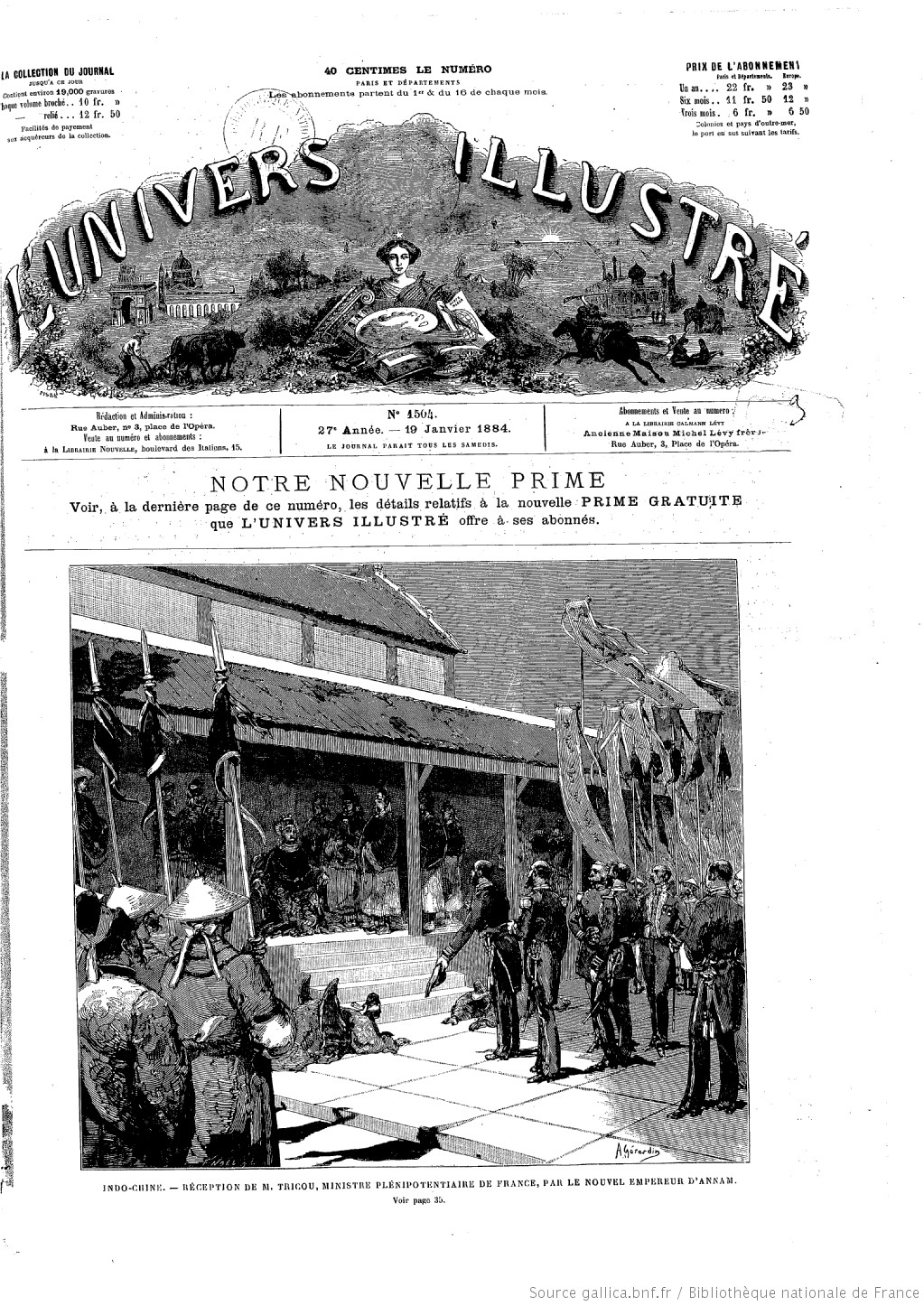 Indo-Chine - Réception de M. Tricou, ministre Plénipotentiaire de France, par le nouvel empereur d'Annam